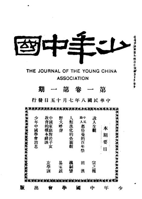 《少年中国》的第一卷第一期